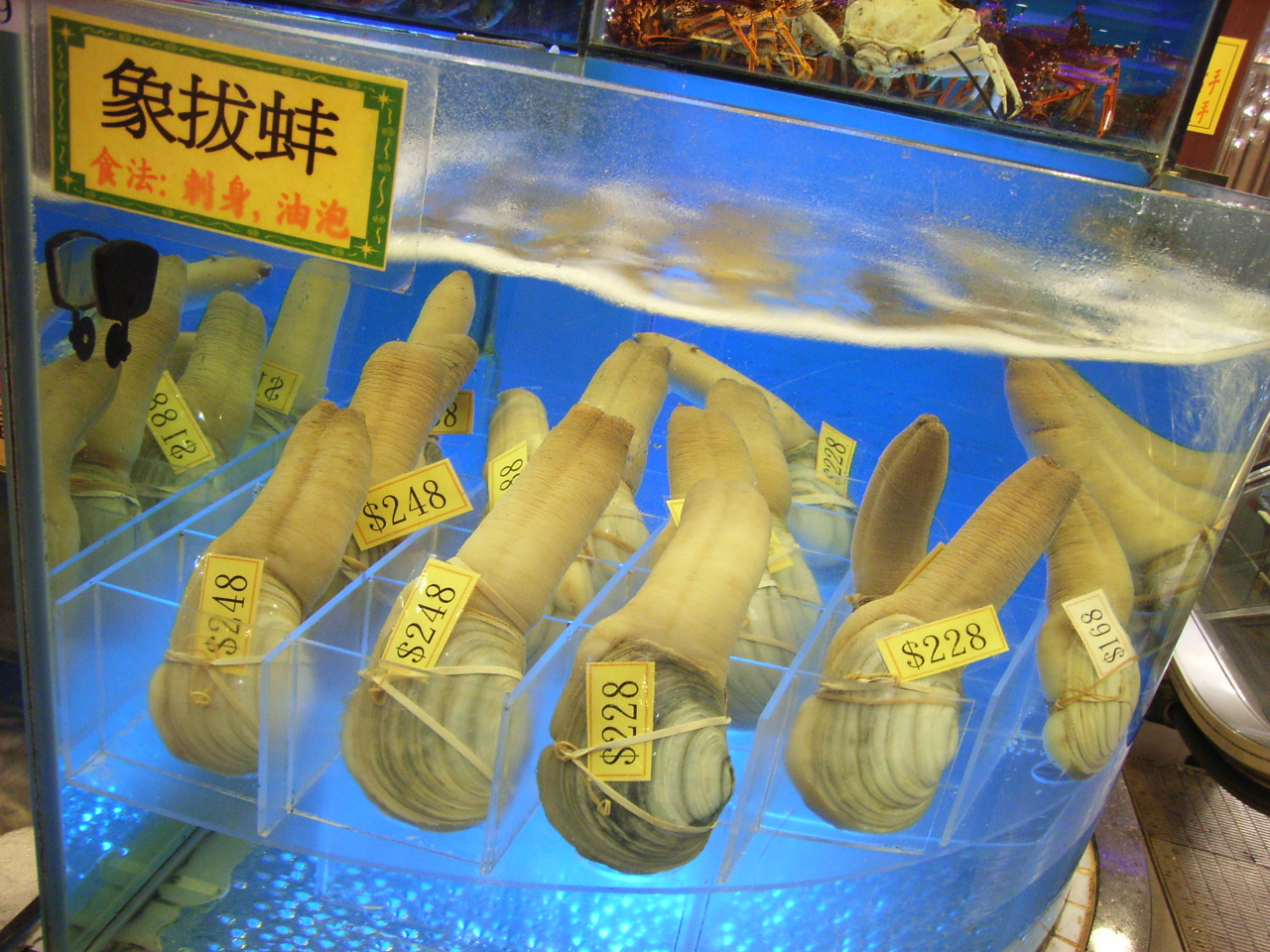 Geoduck 象拔蚌 User:Starest Westst Geoduck